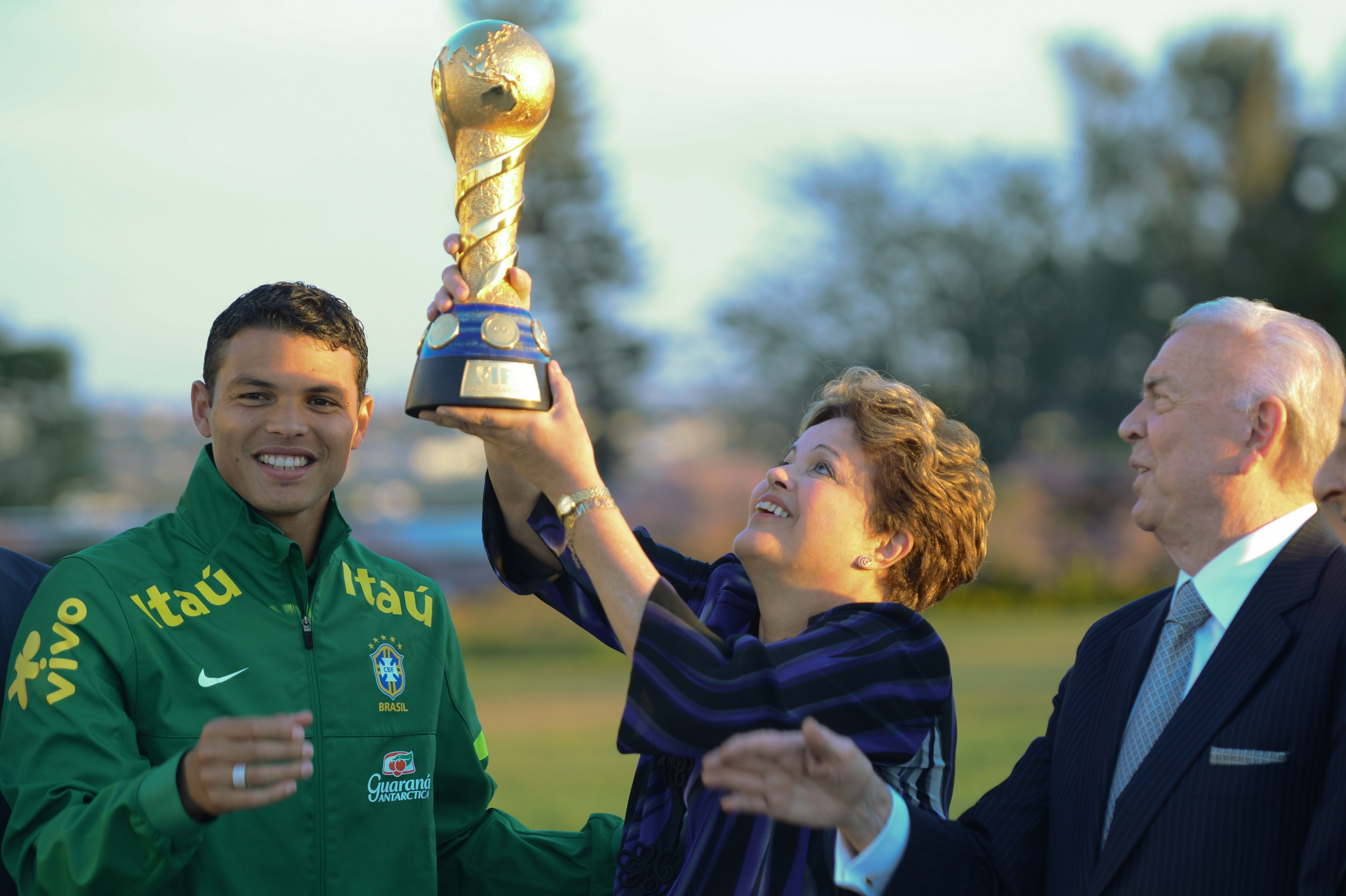 Presidenta Dilma Rousseff recebe Seleção Brasileira de Futebol